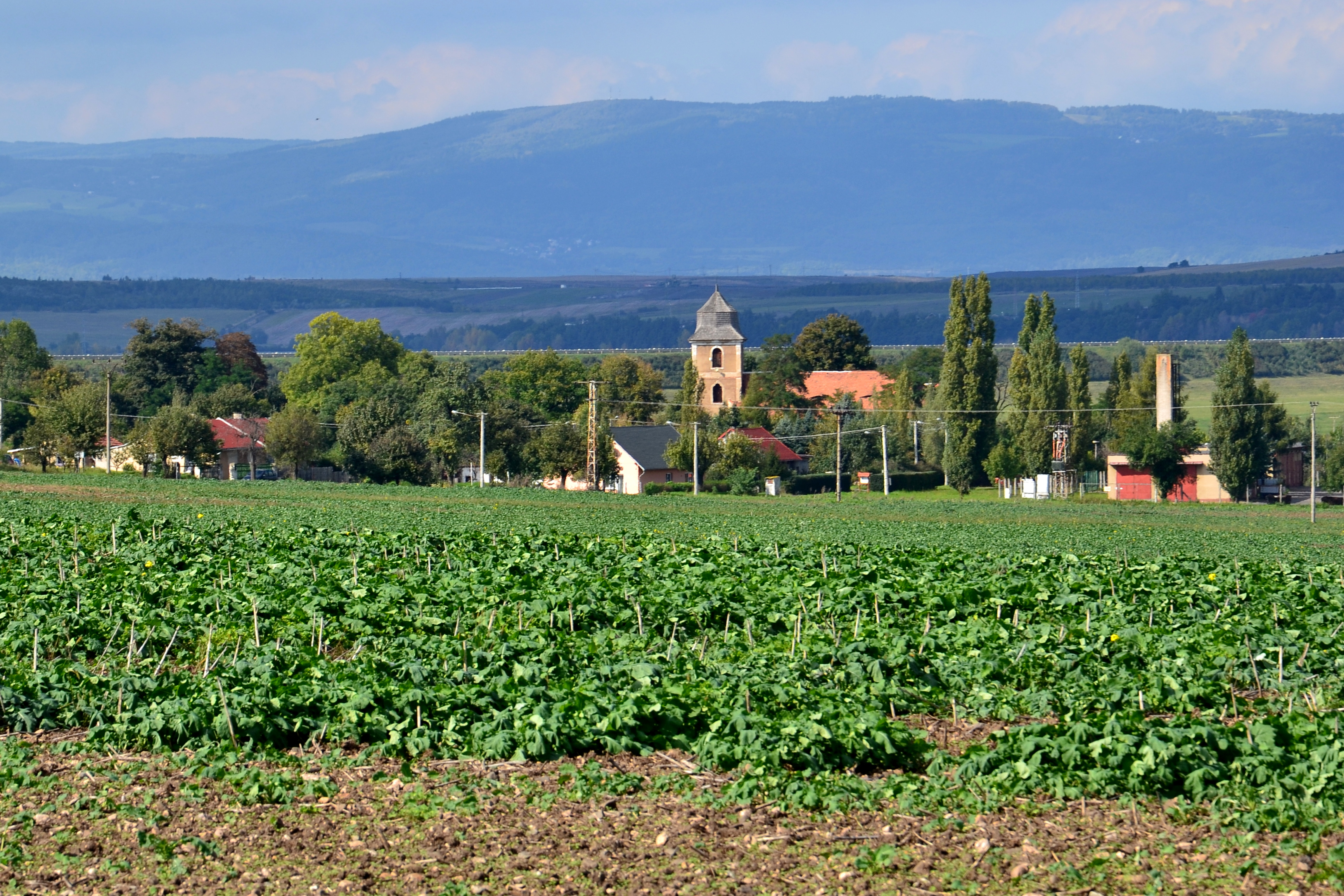 Soběsuky - pohled od Roztyl